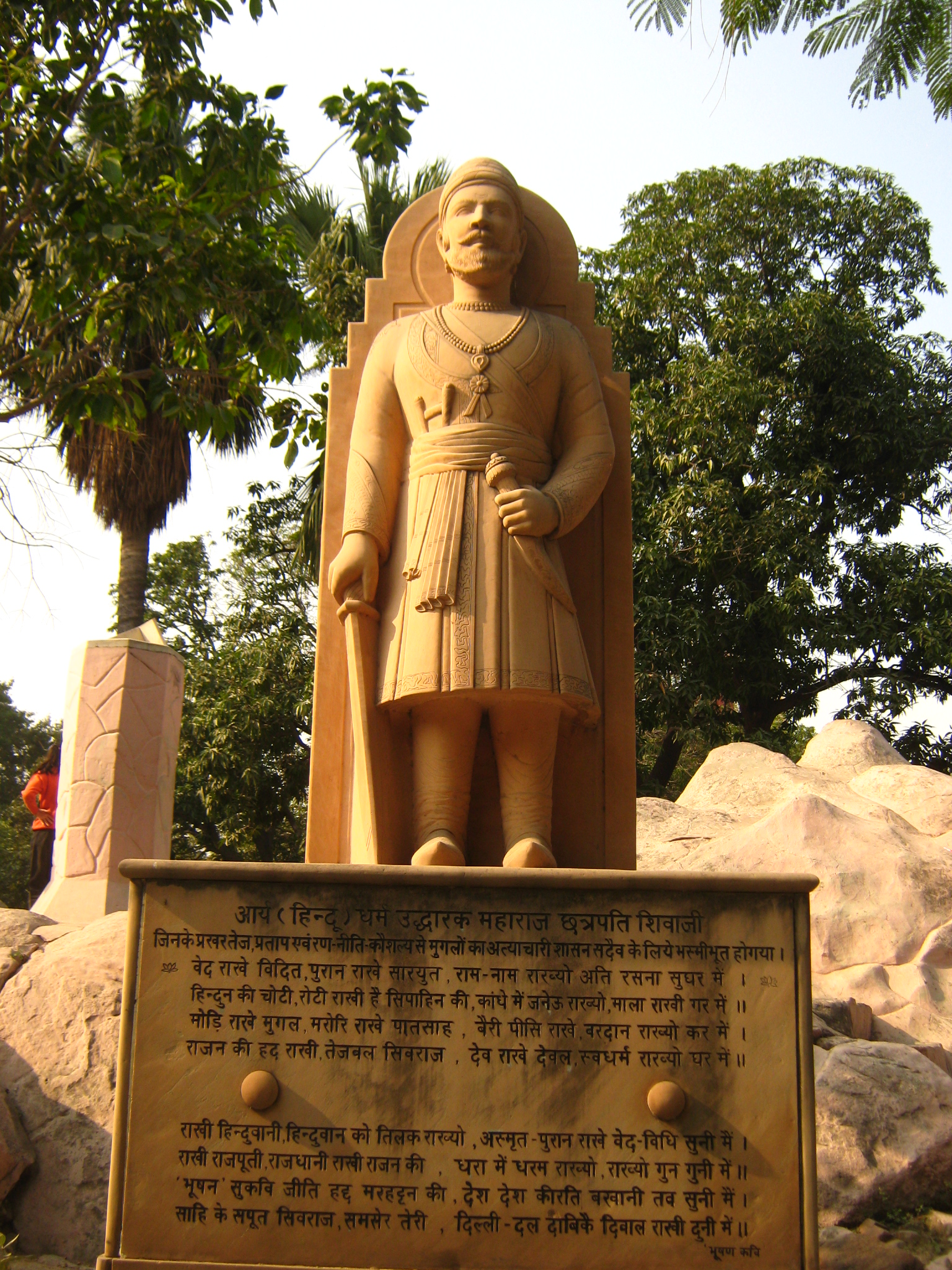 बिरला मंदिर, दिल्लीमें शिवाजी की मूर्ति